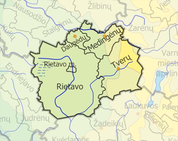 Padaryta iš :image:LietuvosSeniunijos.png